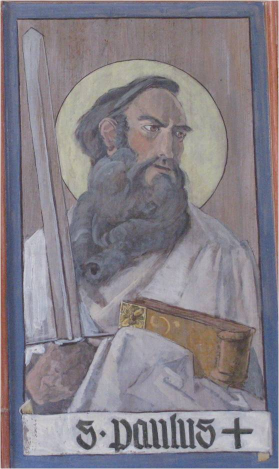 Deutschland - Bayern - Landkreis Lindau - Nonnenhorn, St. Jakobus-Kapelle: Bildtafel des Apostels Paulus